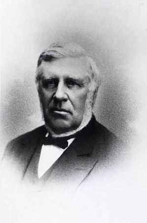 Vilhjálmur Ludvig Finsen (1823-1892), Danish judge